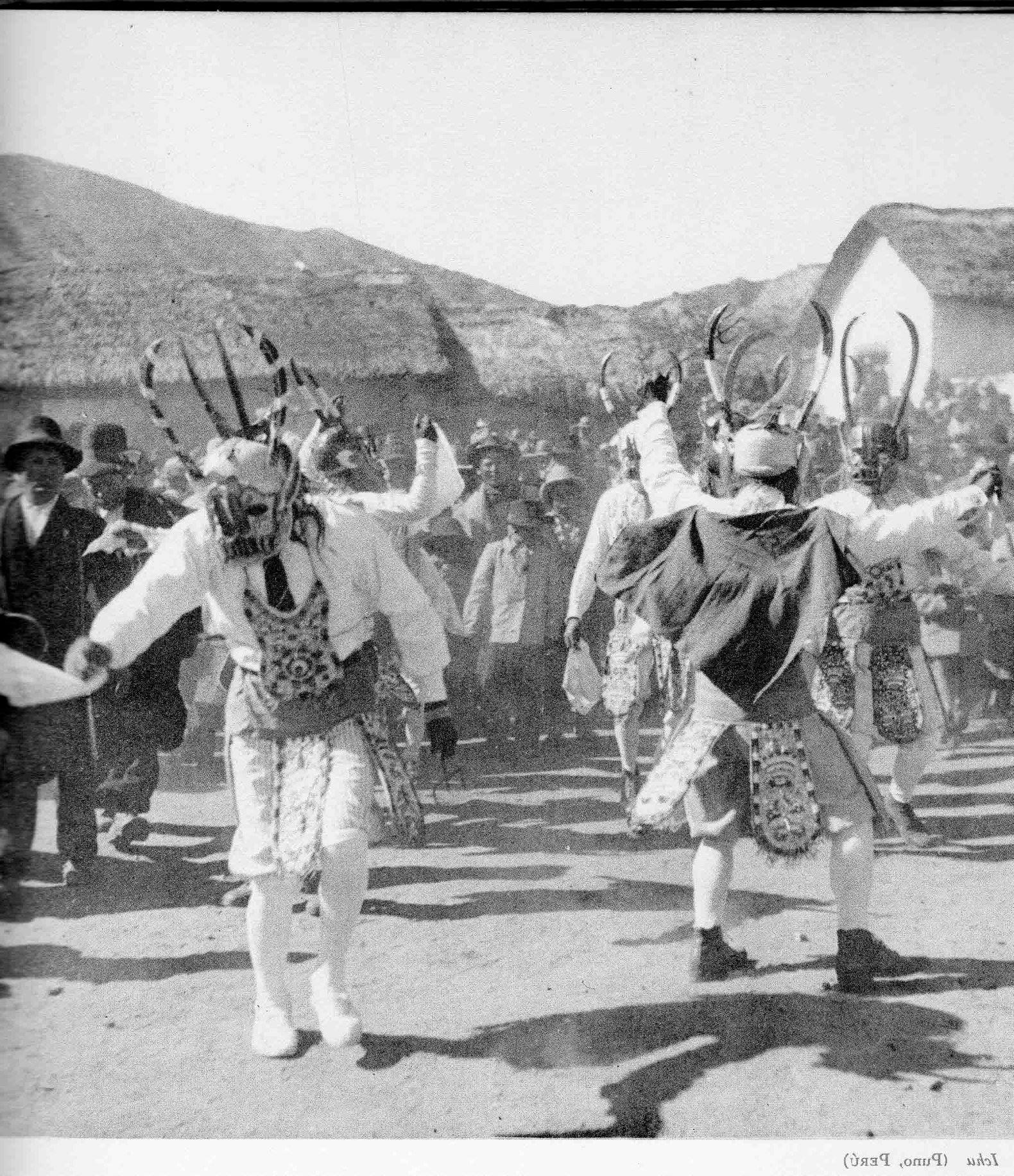 Pierre Verger de nacionalidad francesa recorre Puno donde incluye numerosas expresiones del altiplano peruano, a donde llegó en el año 1939. "Fiestas y danzas en el cuzco y los andes". Pierre Verger. Editorial Sudamericana, Buenos Aires 1945. Recuperado por Carlos Portugal Mendoza 2018